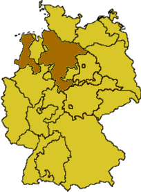 Ekd-hannover